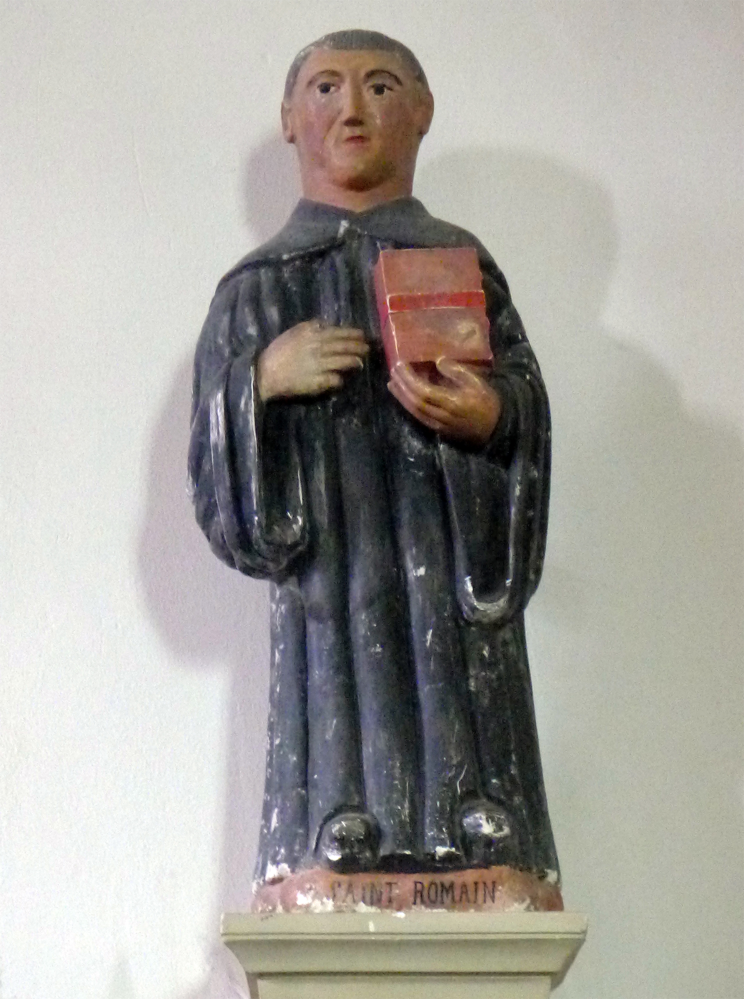 Église Saint-Pierre-et-Saint-Romain (statue de St Romain) - Savennières (France)